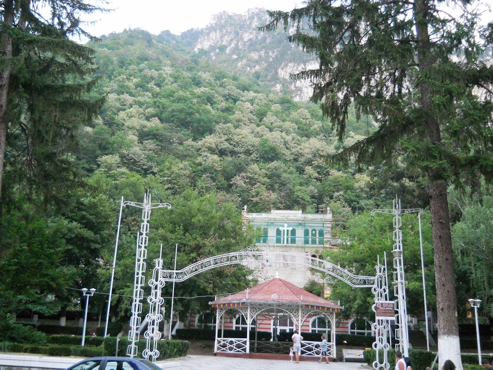 Monument istoric 03